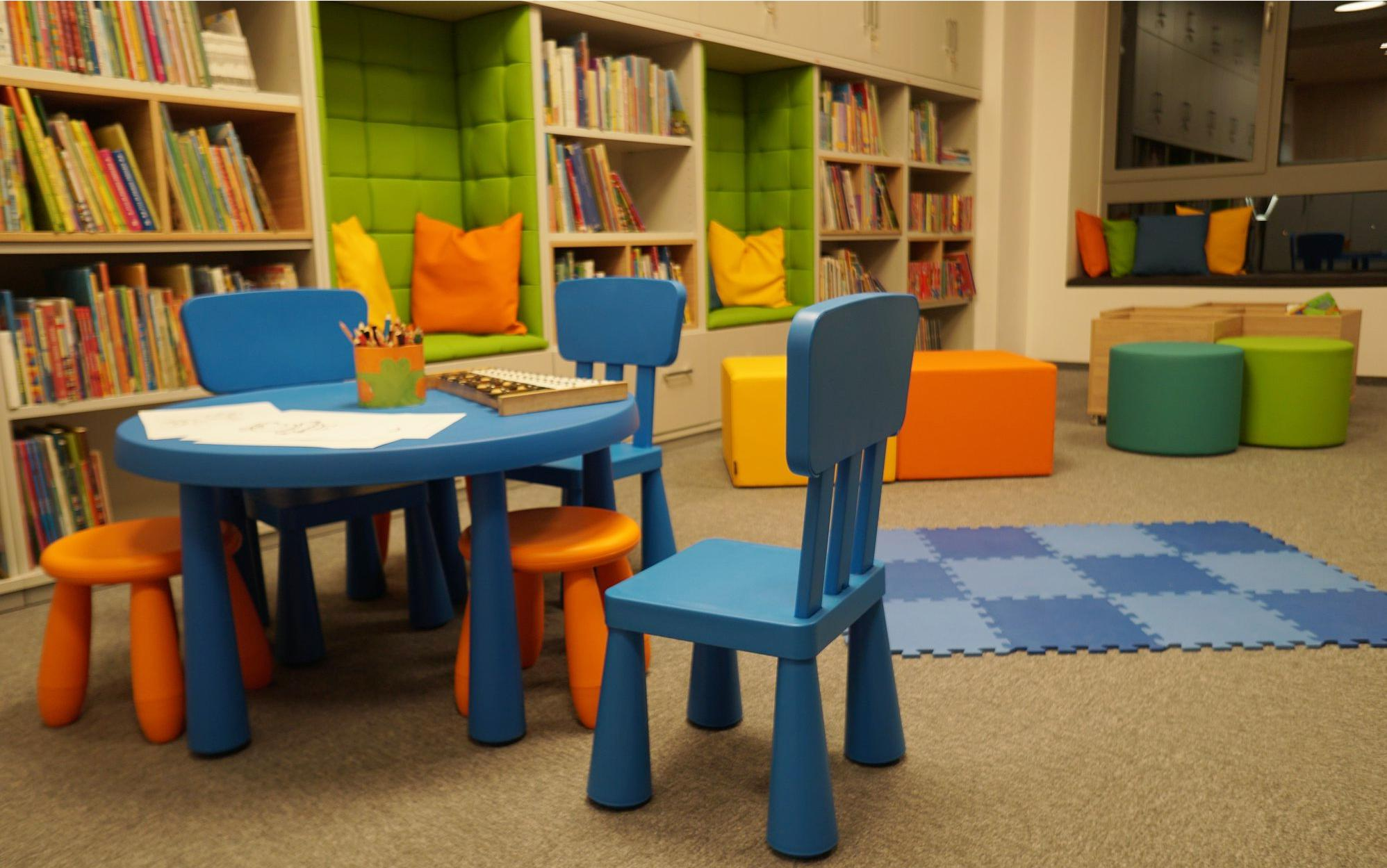 Gminna Biblioteka Publiczna w Kłodawie, kącik dziecięcy, w budynku Gminnego Centrum Kultury w Kłodawie, ul. Jeziorna 8